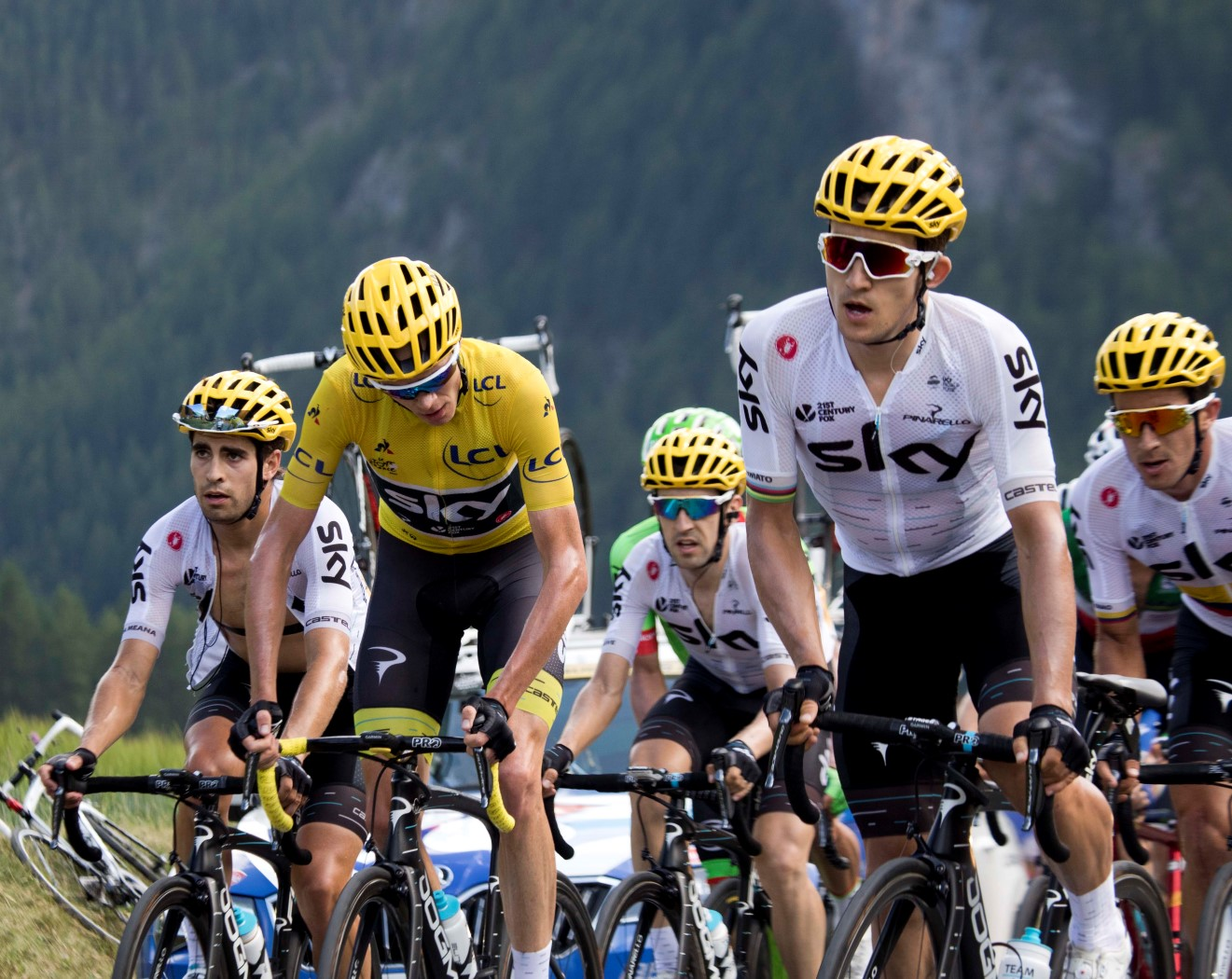 20-7_5 sky peloton